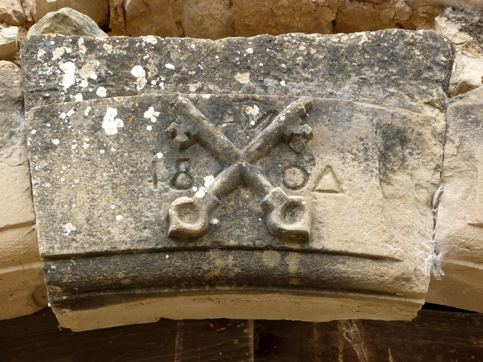 Capella de Sant Pere de Magrà (Castellfollit de Riubregós): les claus de Sant Pere al dintell de la porta